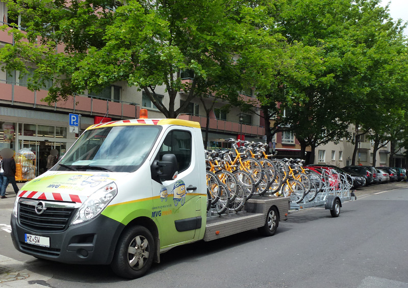 Transportfahrzeug für die MVGmeinRad.